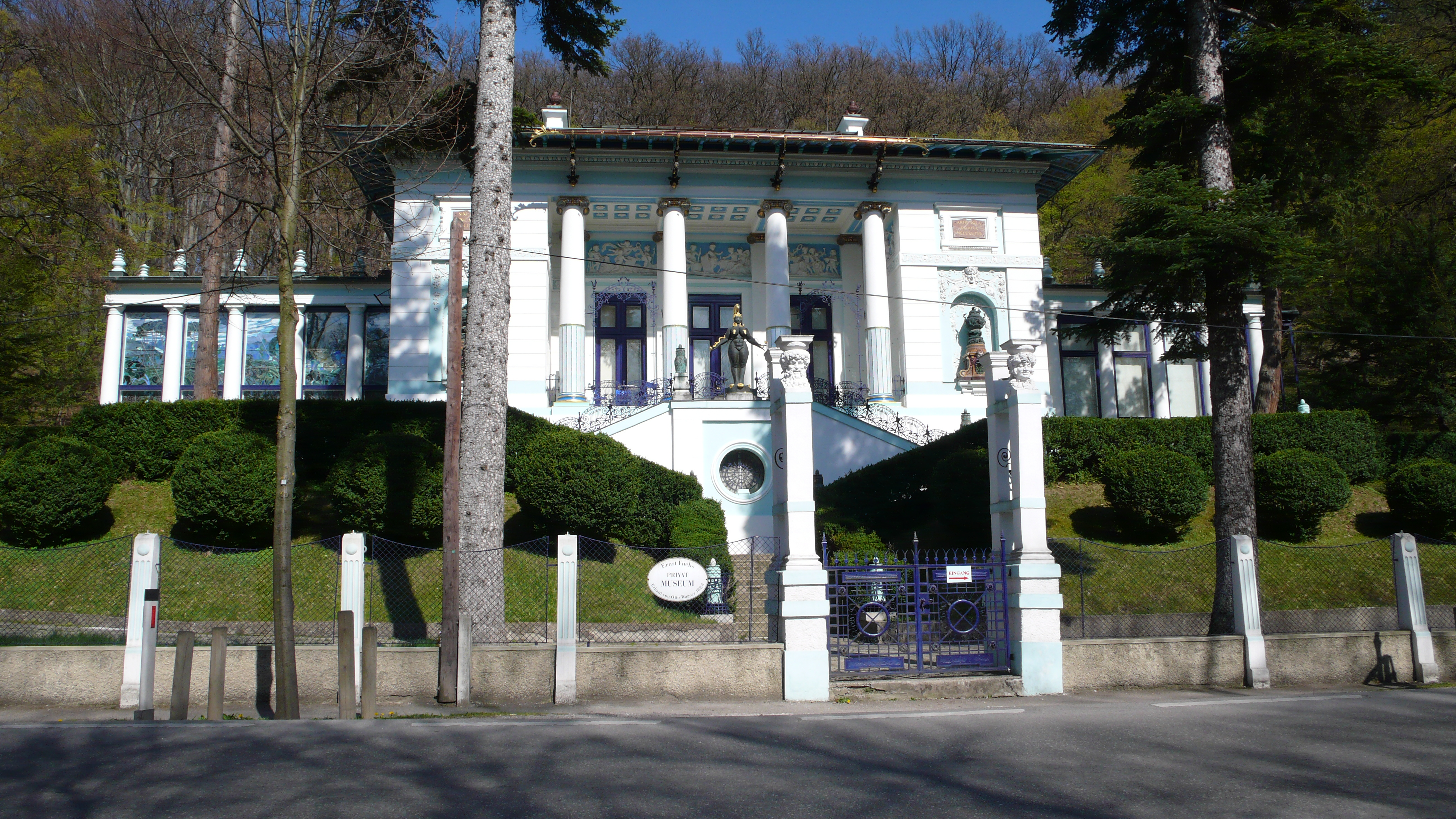 Erste Wagner Villa (Ben-Tiber-Villa) Wien, Otto Wagner